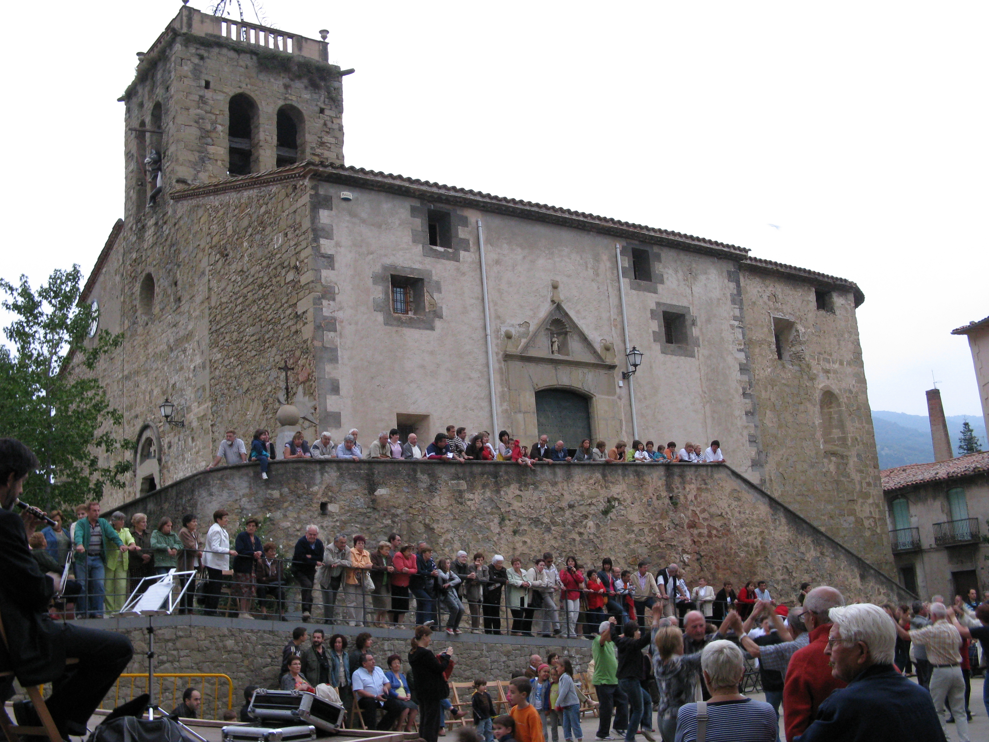 Romanische Kirche "Sant Esteve d'en Bas" (Vals d'en Bas, Nähe Olot, Katalonien, Spanien). Sardanafest auf dem Kirchplatz